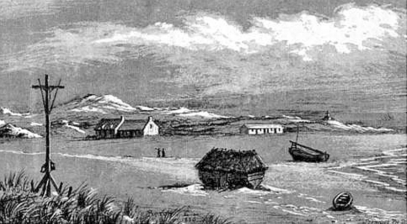 À Berck dans le Pas-de-Calais, la maison de Mme Brillard, dite Marie-Anne-Toute-Seule, qui accueille des enfants scorfuleux placés par l'Assistance Publique de Paris. Gravure, d'un dessin d'Émile Lavezzari réalisé vers 1860, et publié en 1885.